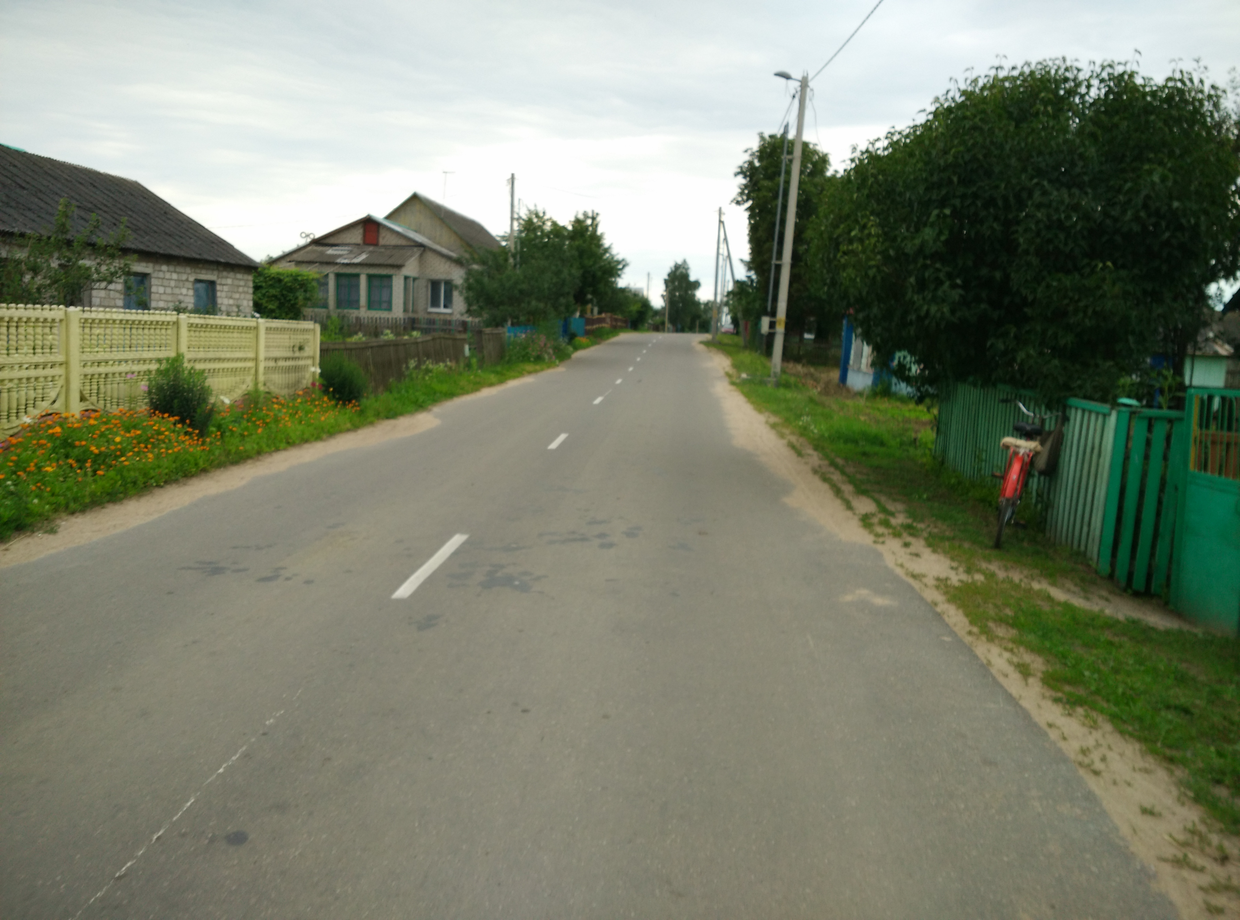 Вёска Узляны, Пухавіцкі раён.